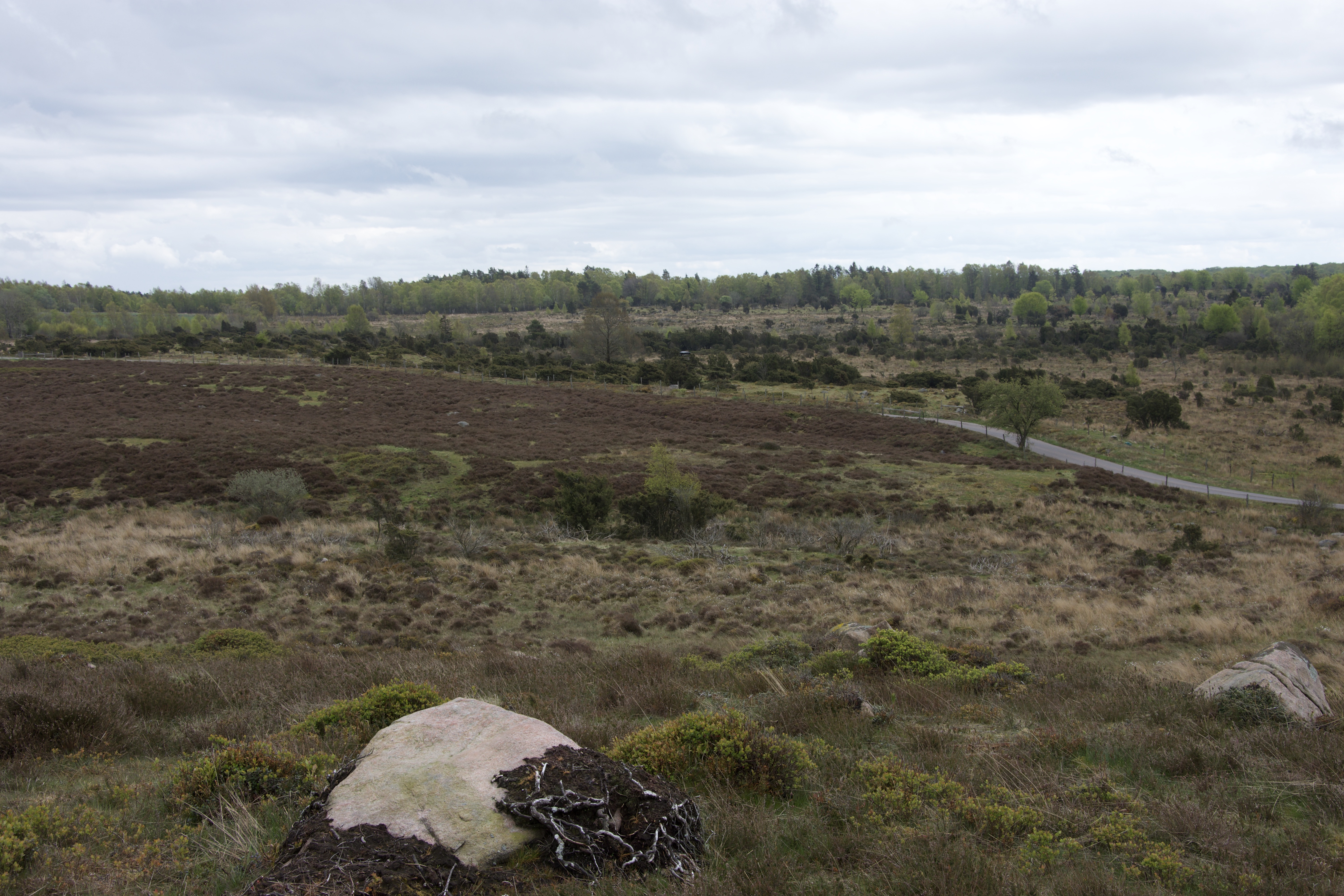 Lya Ljunghed